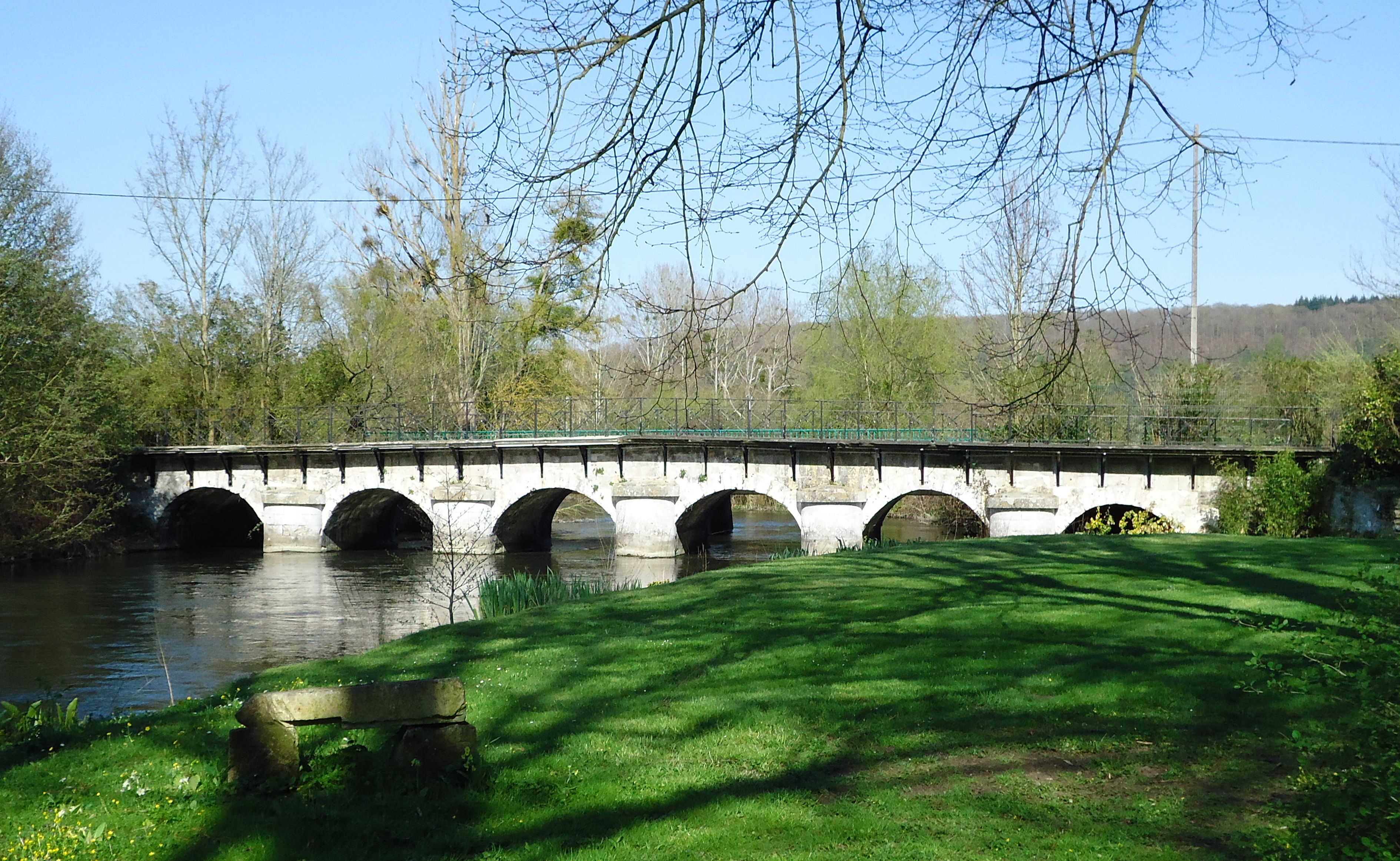 Pont des Planches (vue amont) - Acquigny - Eure (27)